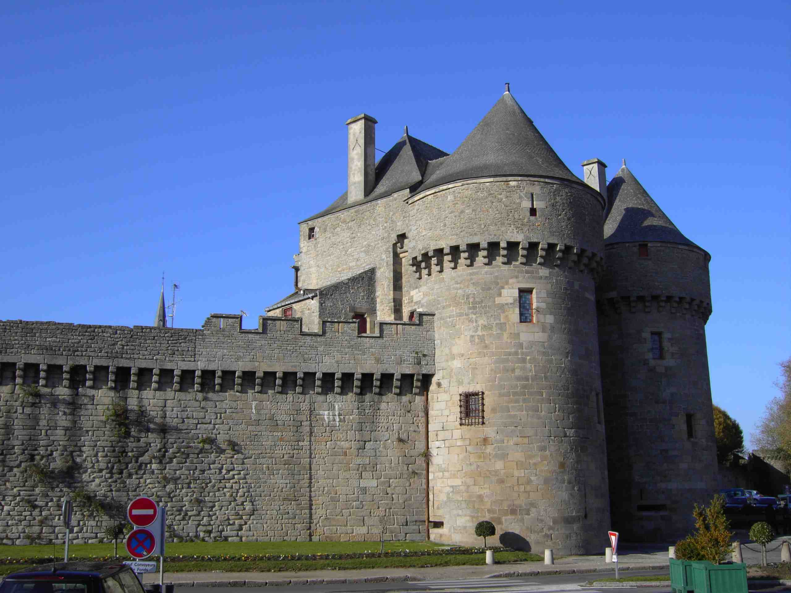 Eingangstor von Guérande. Fotograf: Bernd Reichelt. Aufnahme: November 2005.